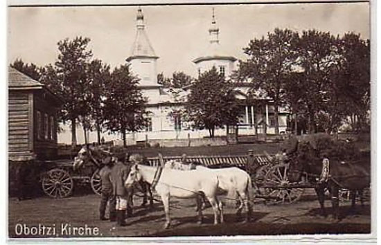 Беларуская (тарашкевіца): Абольцы (Abolcy), пляц Рынак (plac Rynak). Царква